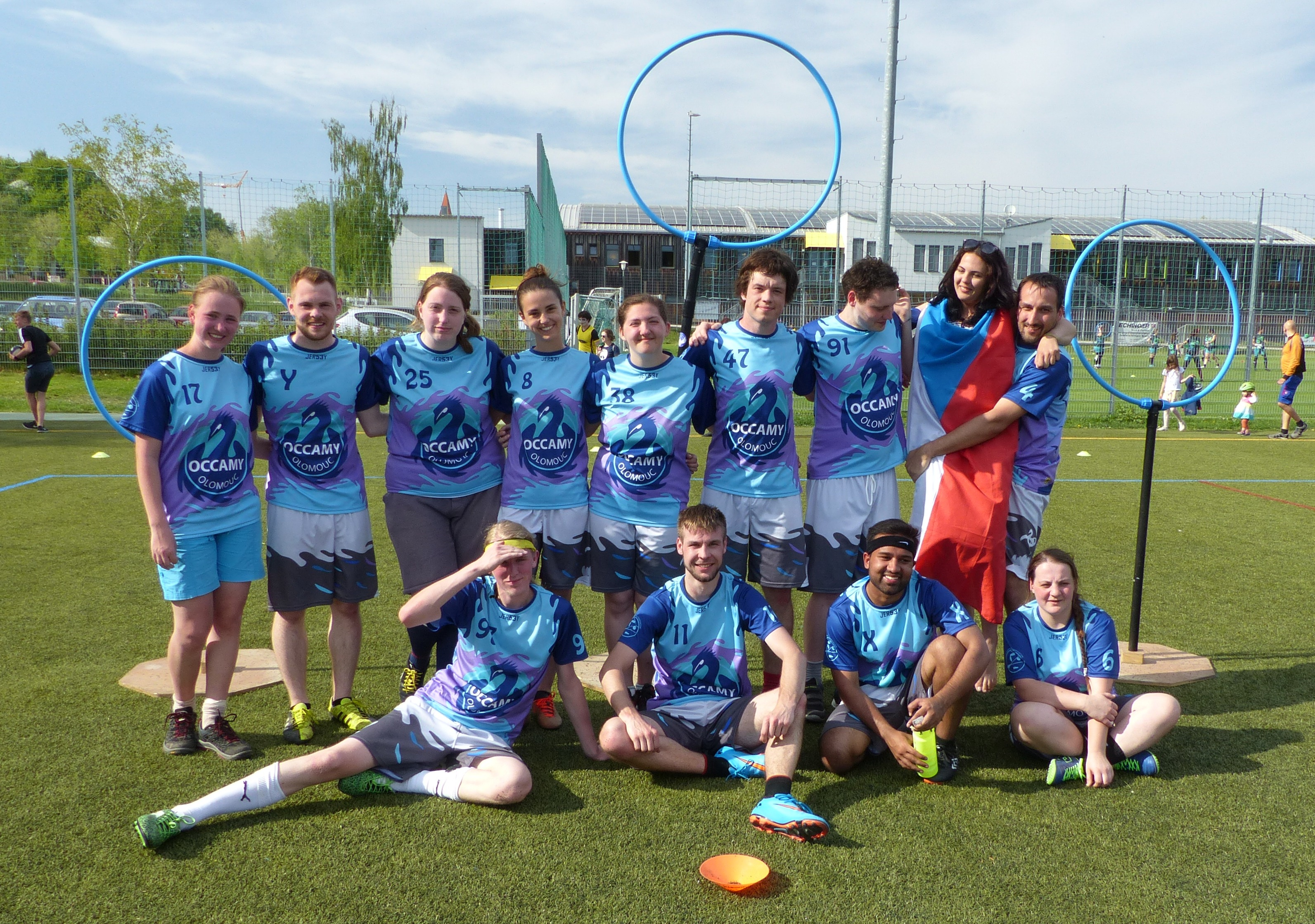 Occamy Olomouc na turnaji EQC 2018